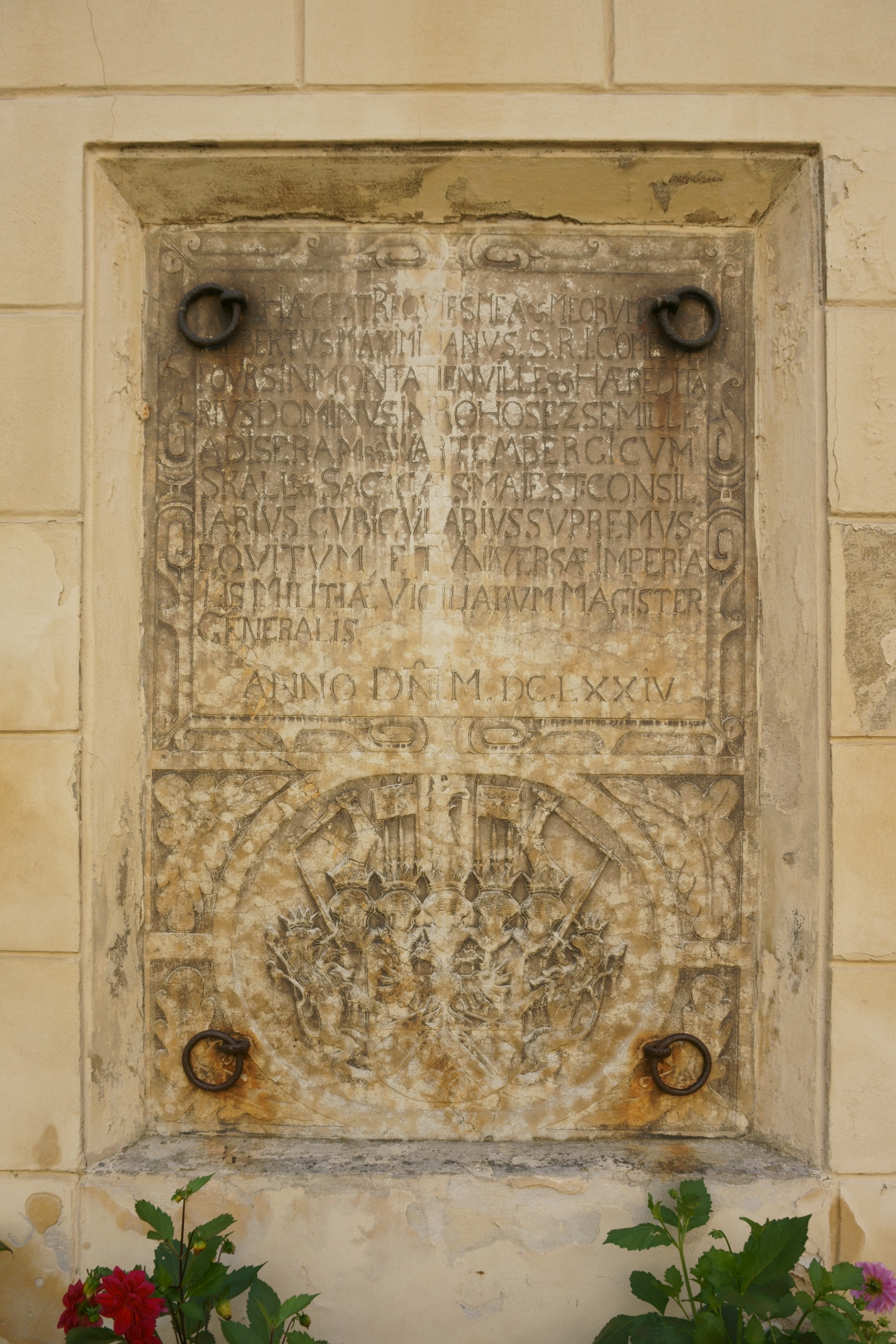 Hrubý Rohozec - nádvoří, náhrobní deska Albrechta Maxmiliána Des Fours. Původně ze sv. Salvátora v Praze, přenesena 1856. [1]